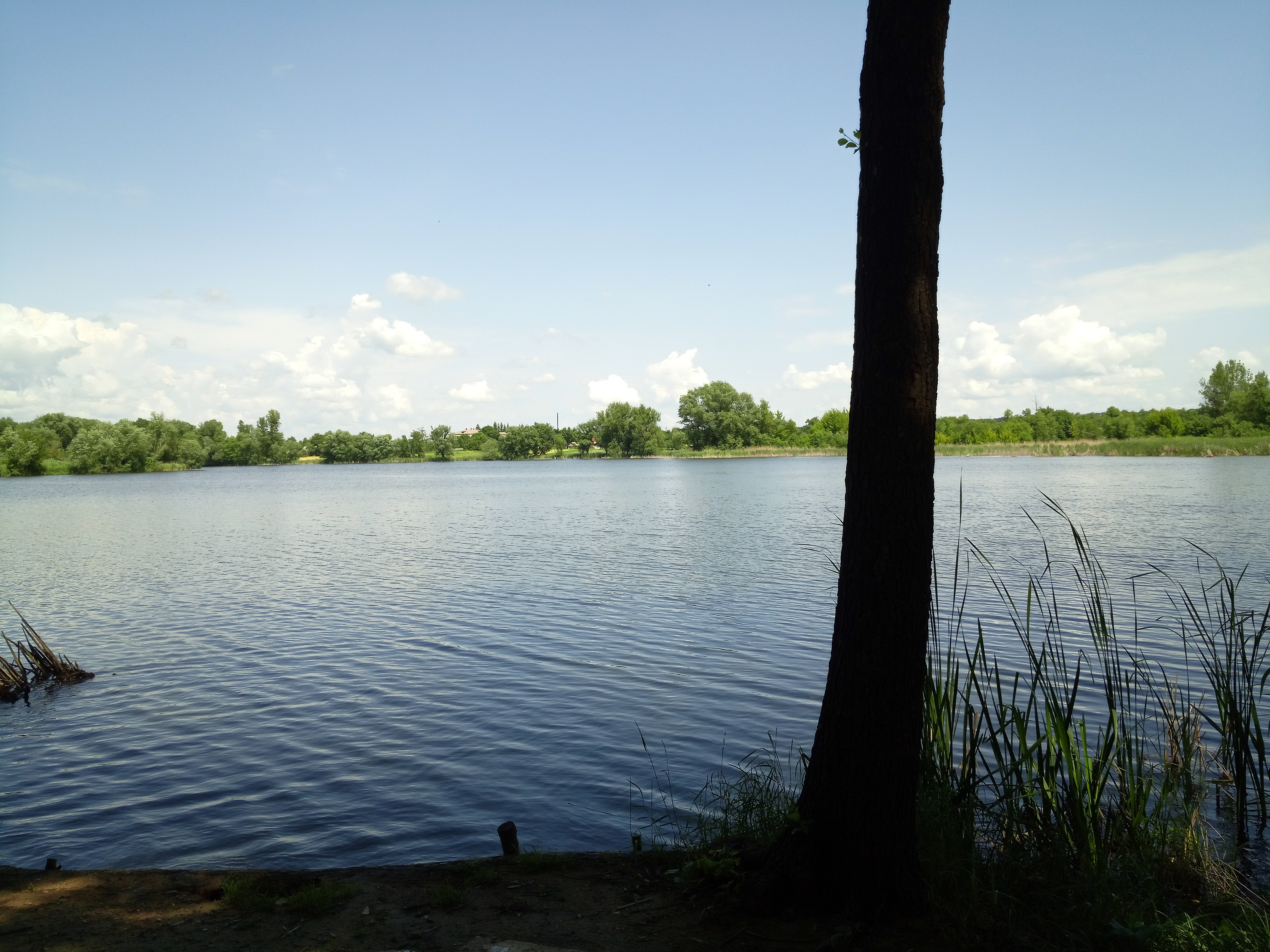 Річка Вербич у межах села Гунчі, верхній ставок (3)